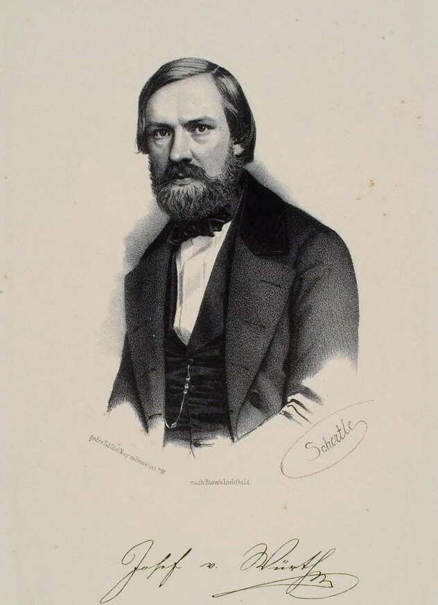 Porträt des Josef Edlen von Würth (1817–1855)